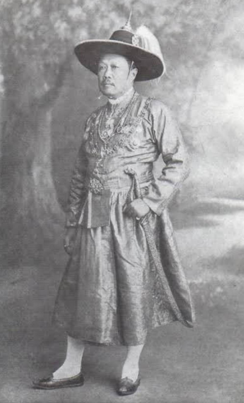 สมเด็จกรมสวัสดิ